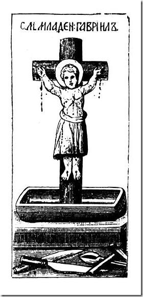 Гавриил Слуцкий (Белостокский) автор: Ф. Г. Солнцев, иллюстрация к сочинению Филарета (Гумилевского) «Жизнеописание русских святых, чтимых Православною Церковью» 1885 год.